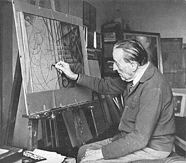 Gerardo Dottori nel suo studio.